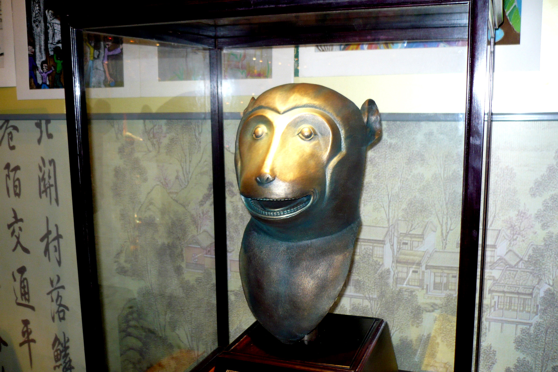 圆明园猴首